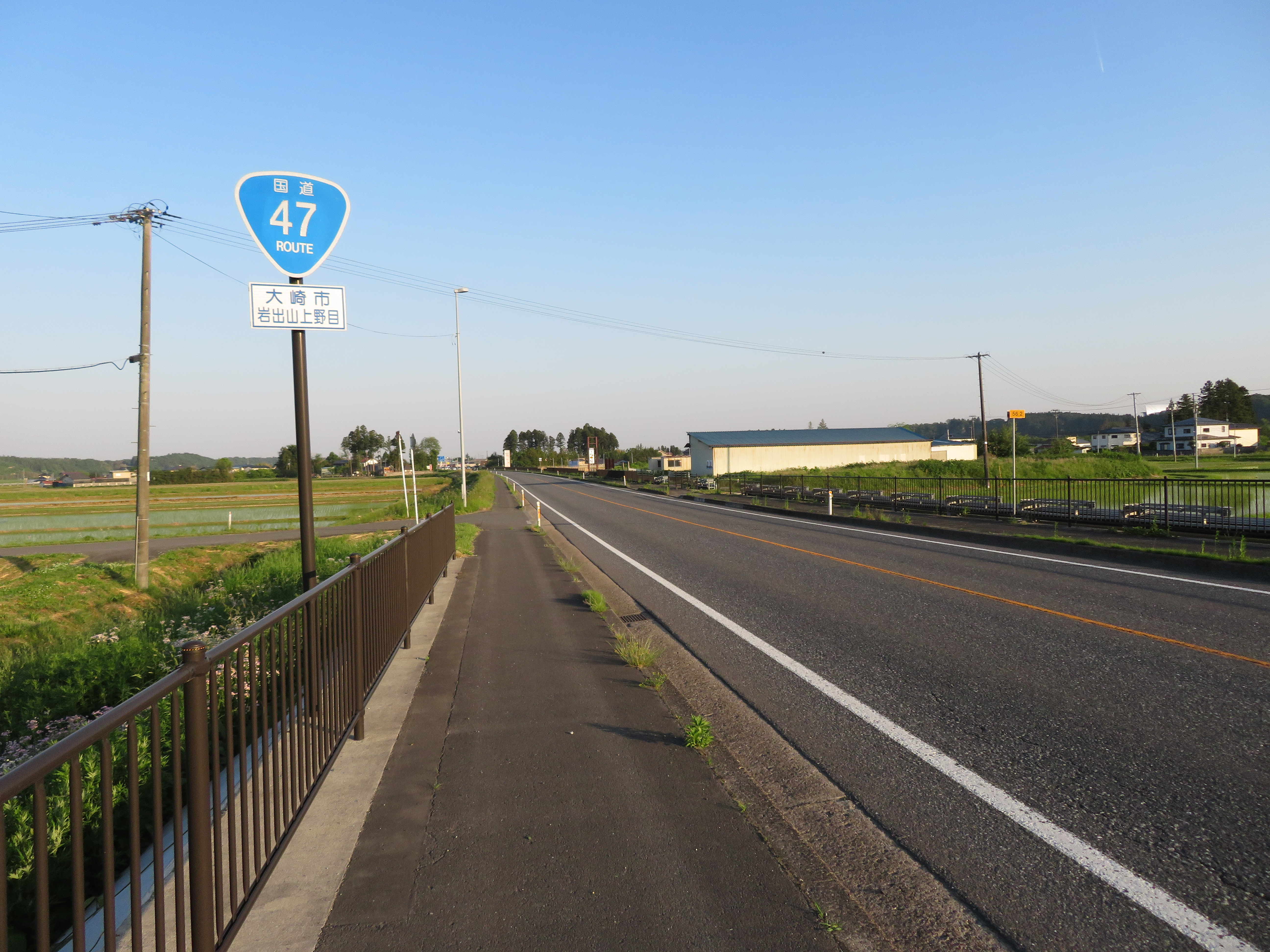 国道47号線岩出山バイパス 宮城県大崎市岩出山上野目付近 Canon PowerShot SX720 HS